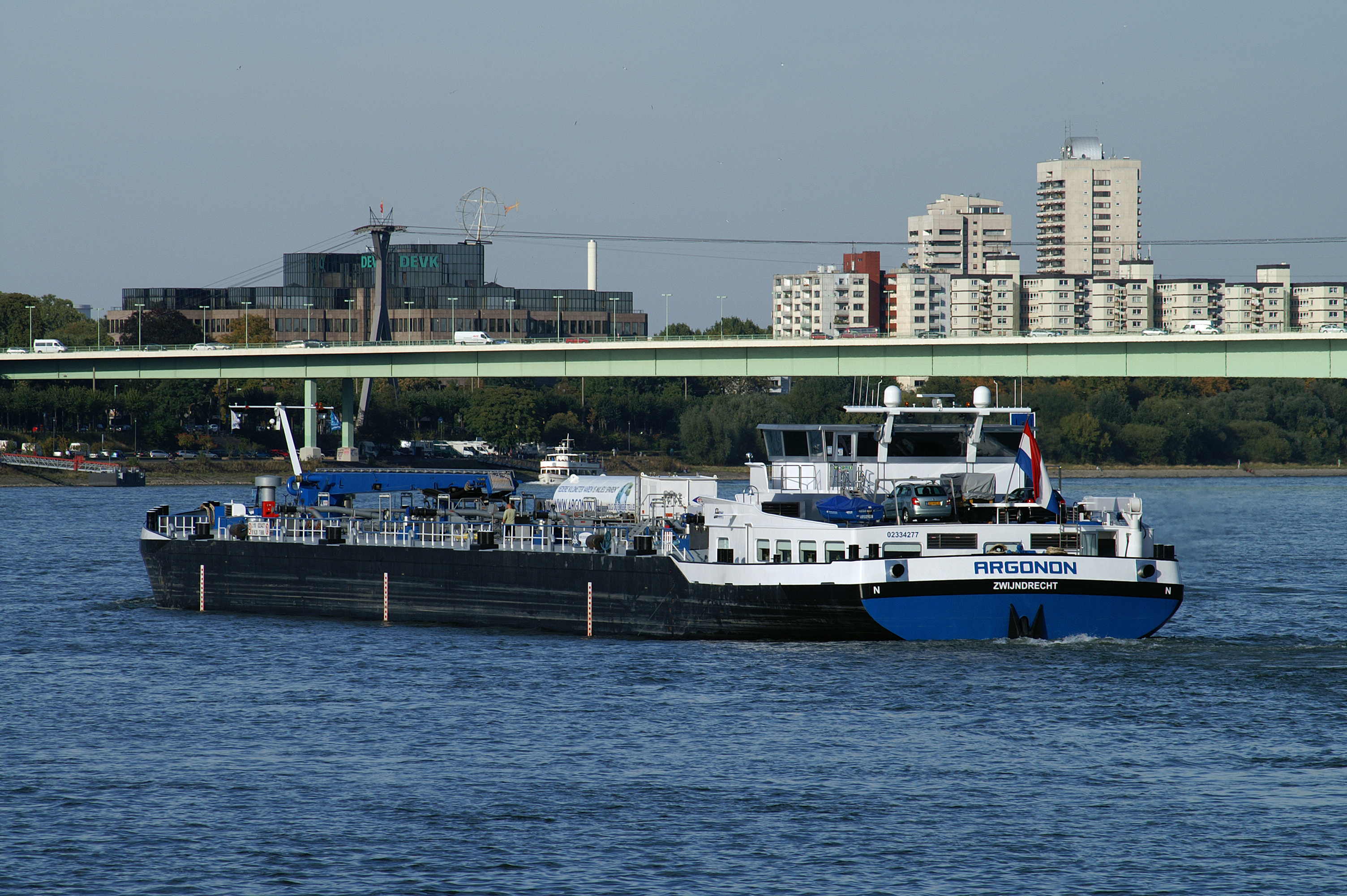 Tank-Motorschiff Argonon auf Durchfahrt in Köln.